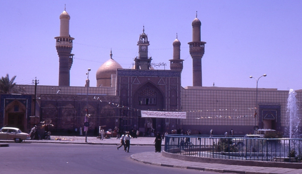 Kadhimayn mosque main entrance in Baghdad 1970